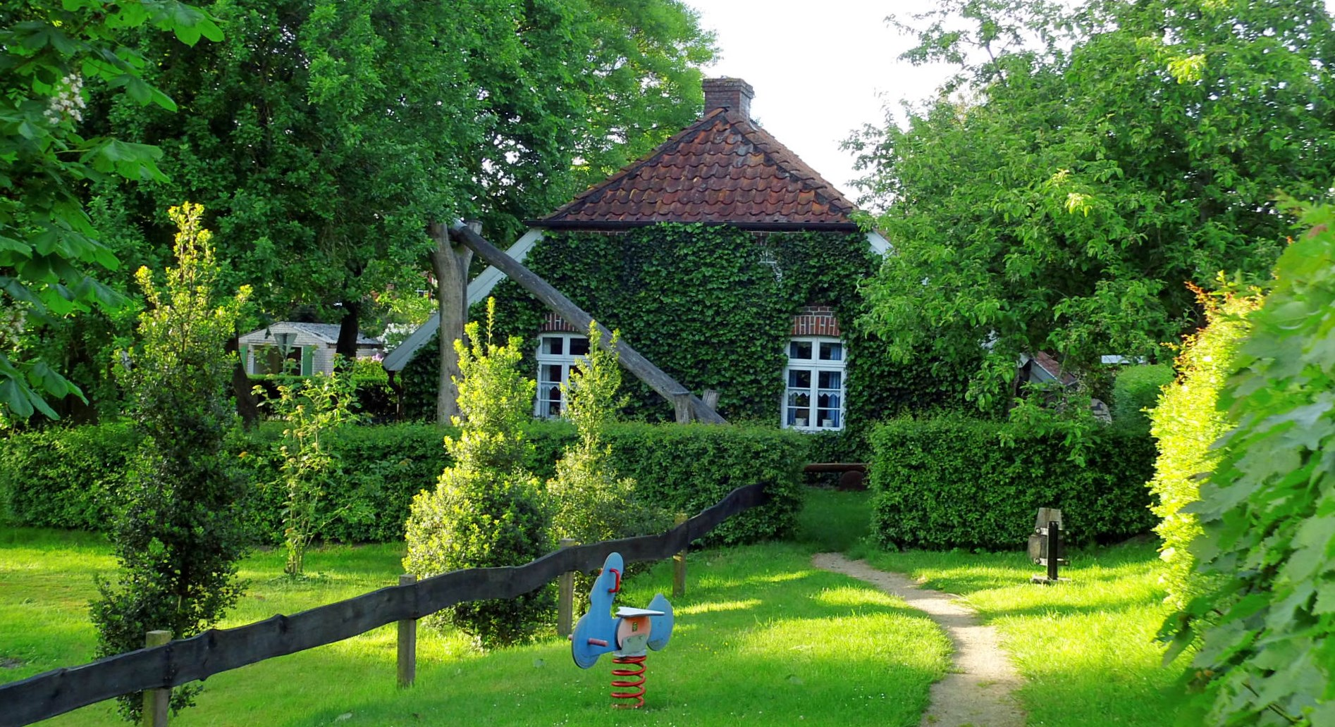 Historische Landarbeiterhaus in der Ortschaft Etzel, Gemeinde Friedeburg, Landkreis Wittmund, Niedersachsen, Deutschland